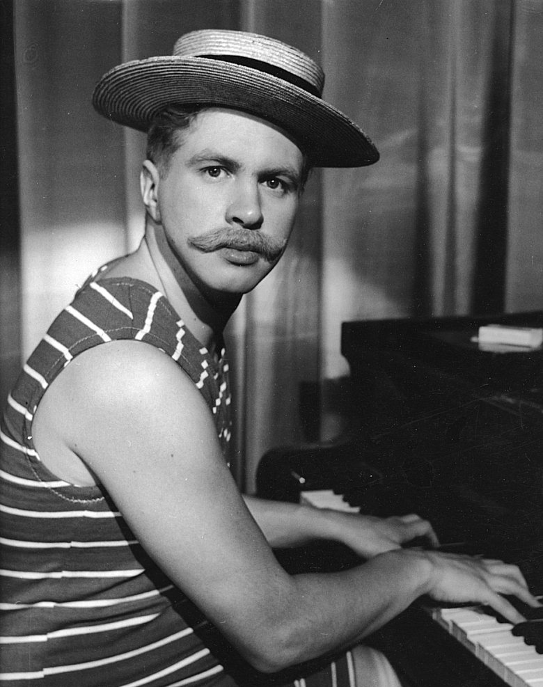 Kai Pahlman in Tähtisumua (1961)